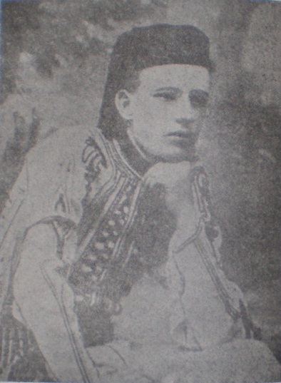 Bogdan Jugović Hajnc